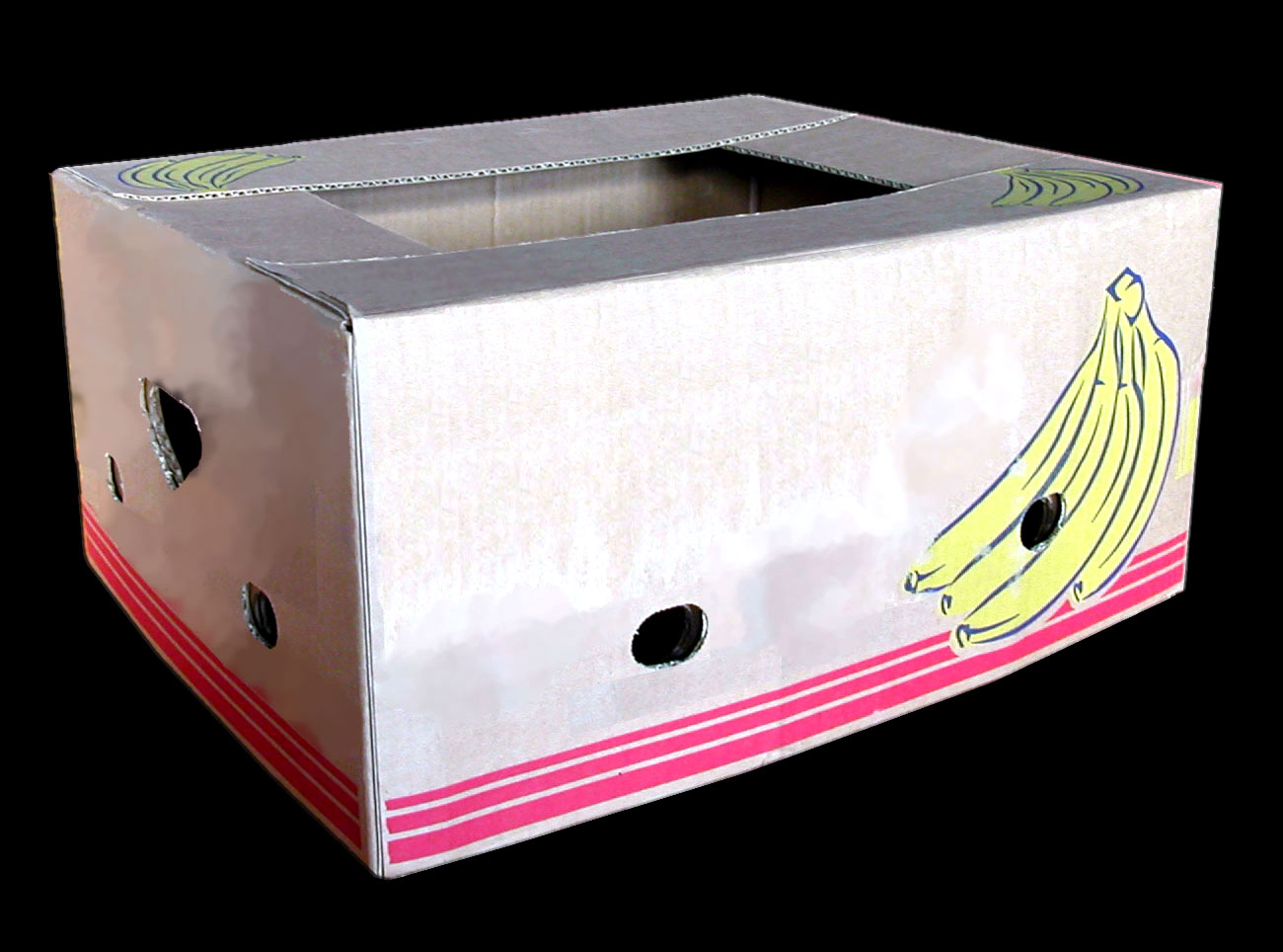 Bananenkiste; H: 25 cm x B: 40cm x T: 50cm